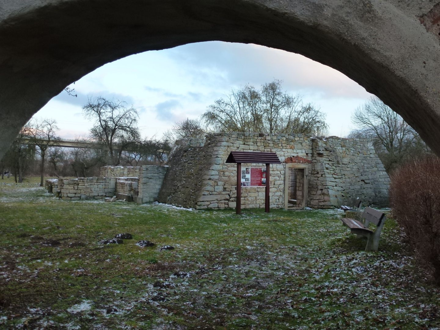 Kirchruine in Schkortleben